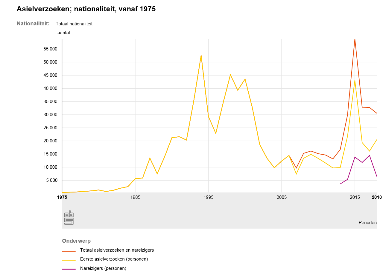 Asielverzoeken vanaf 1975